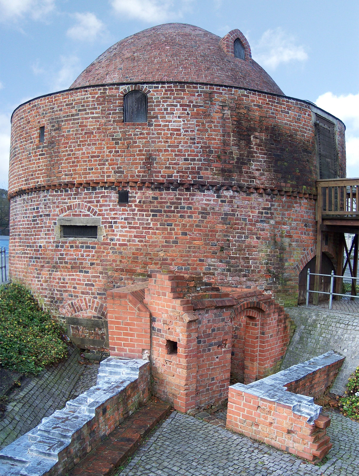 Oldenburg: "Großer Zwinger vor dem Eversten Tor" (Pulverturm) mit Resten der Stadtmauer (Panoramaaufnahme)